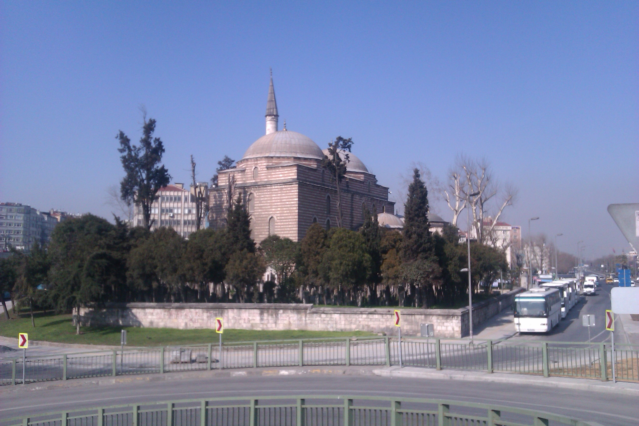 Murat Paşa Mosque